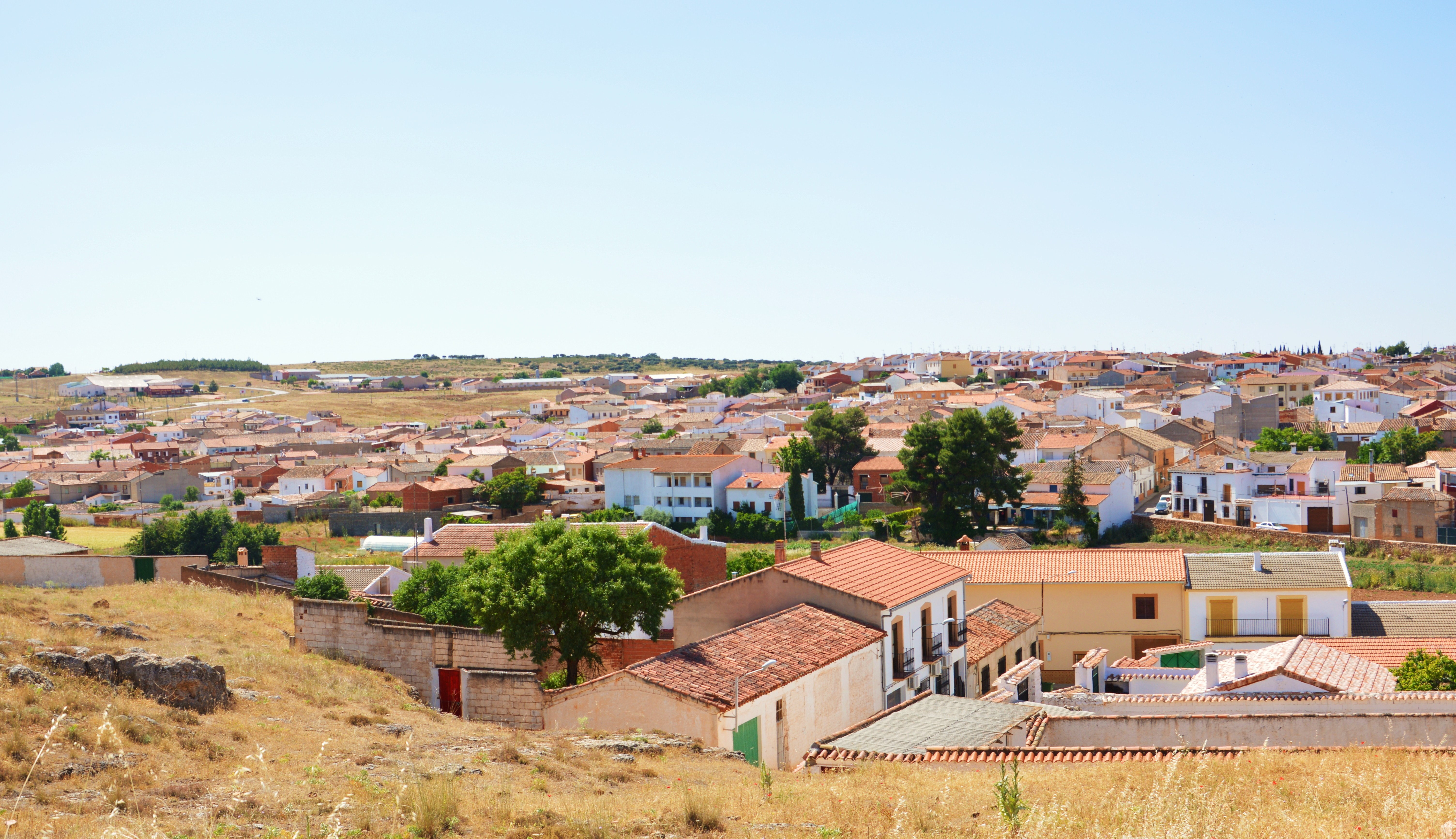 Ossa de Montiel en junio de 2013